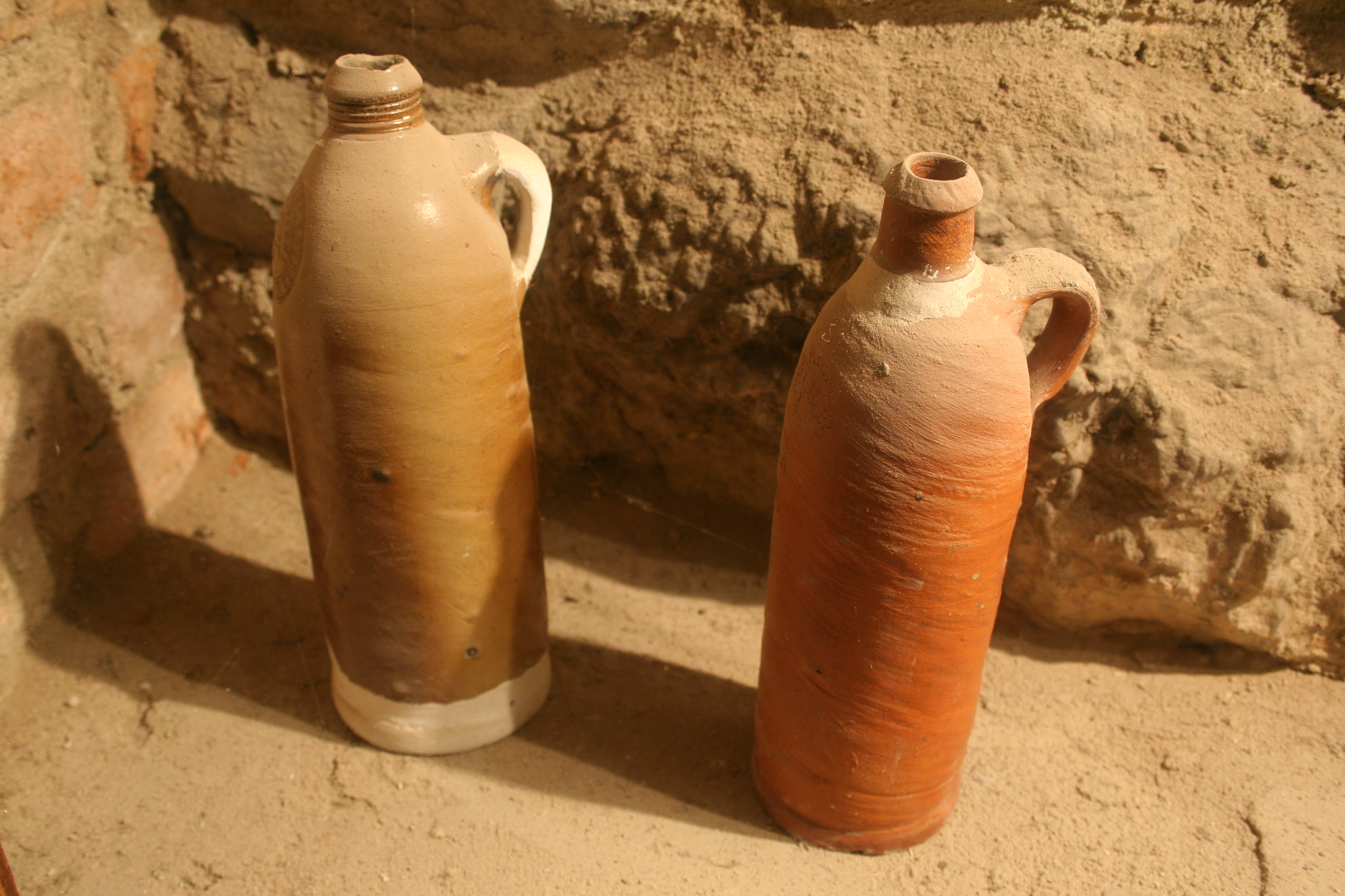 Dawne butelki odkryte w podziemiach Rzeszowa